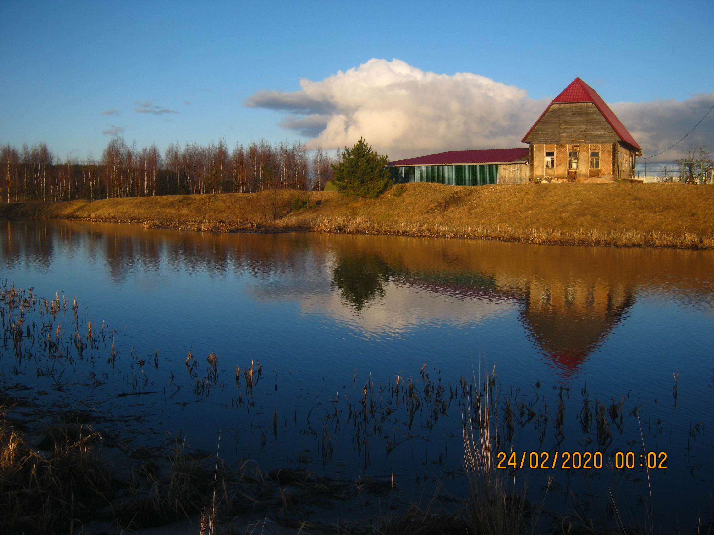 Река Торопа в деревне Заречье.